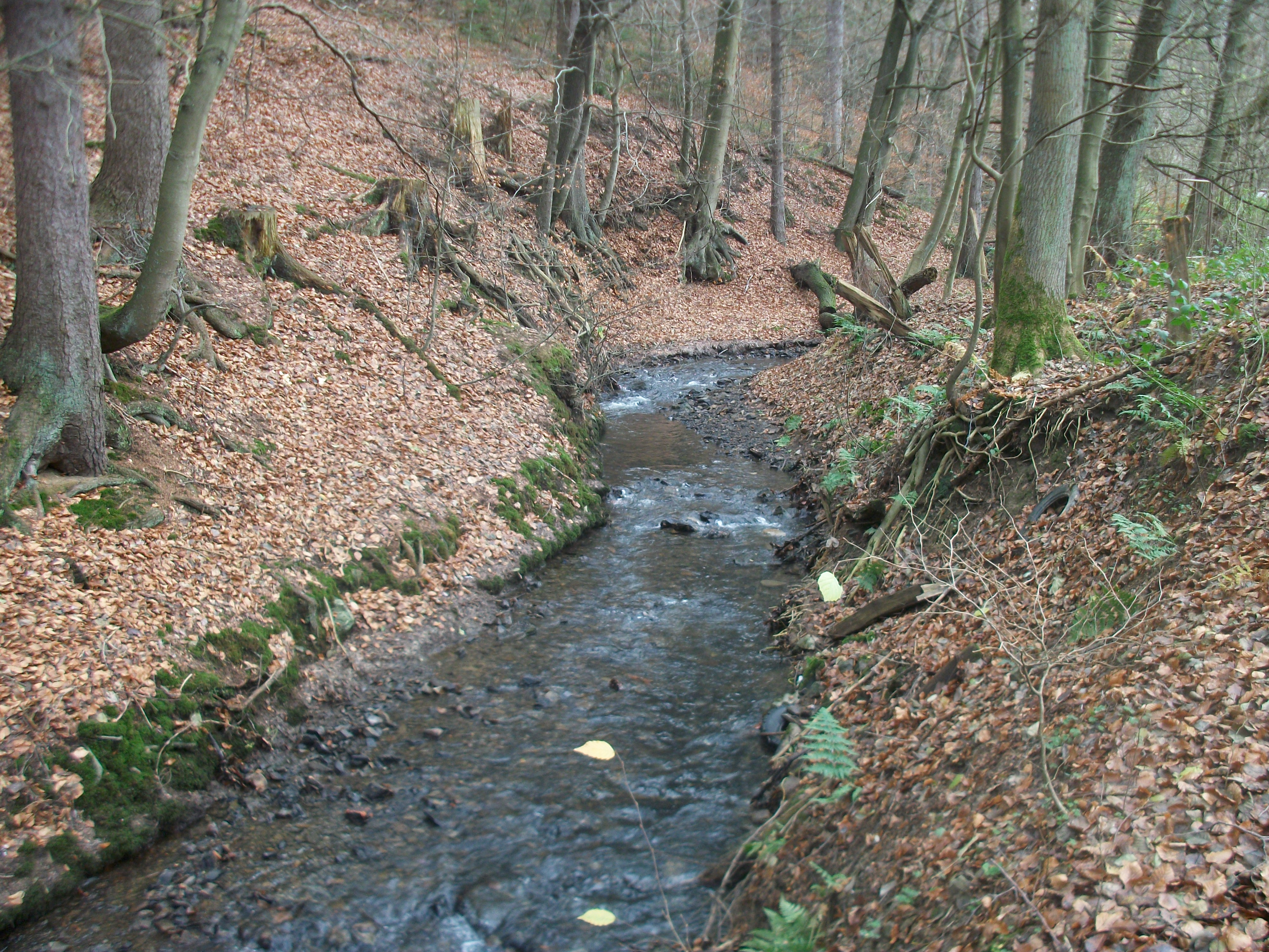 Bachlauf des Mühlenbachs in Arnsberg-Rumbeck